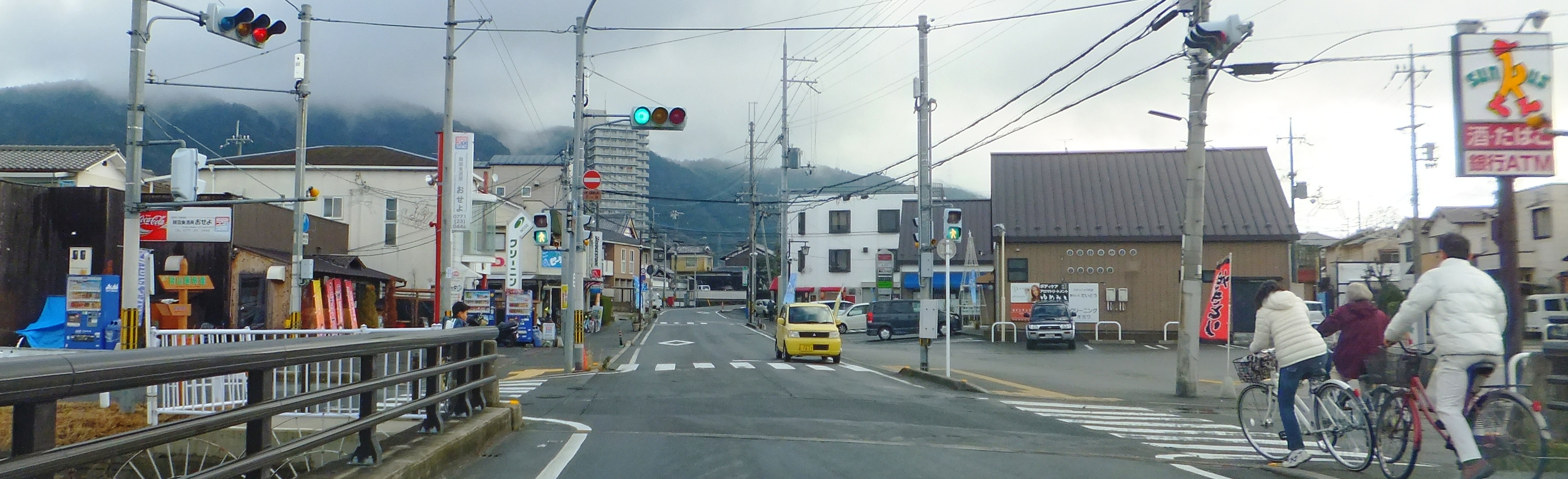 京都府亀岡市馬堀南垣内 京都府道402号王子並河線